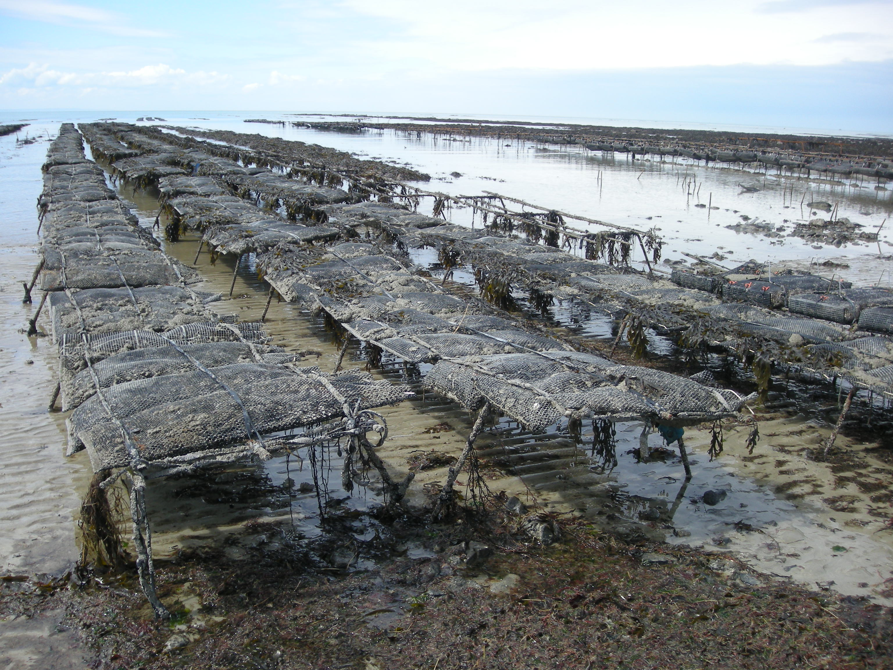 Ostréiculture à Bretteville-sur-Ay (département de la Manche)